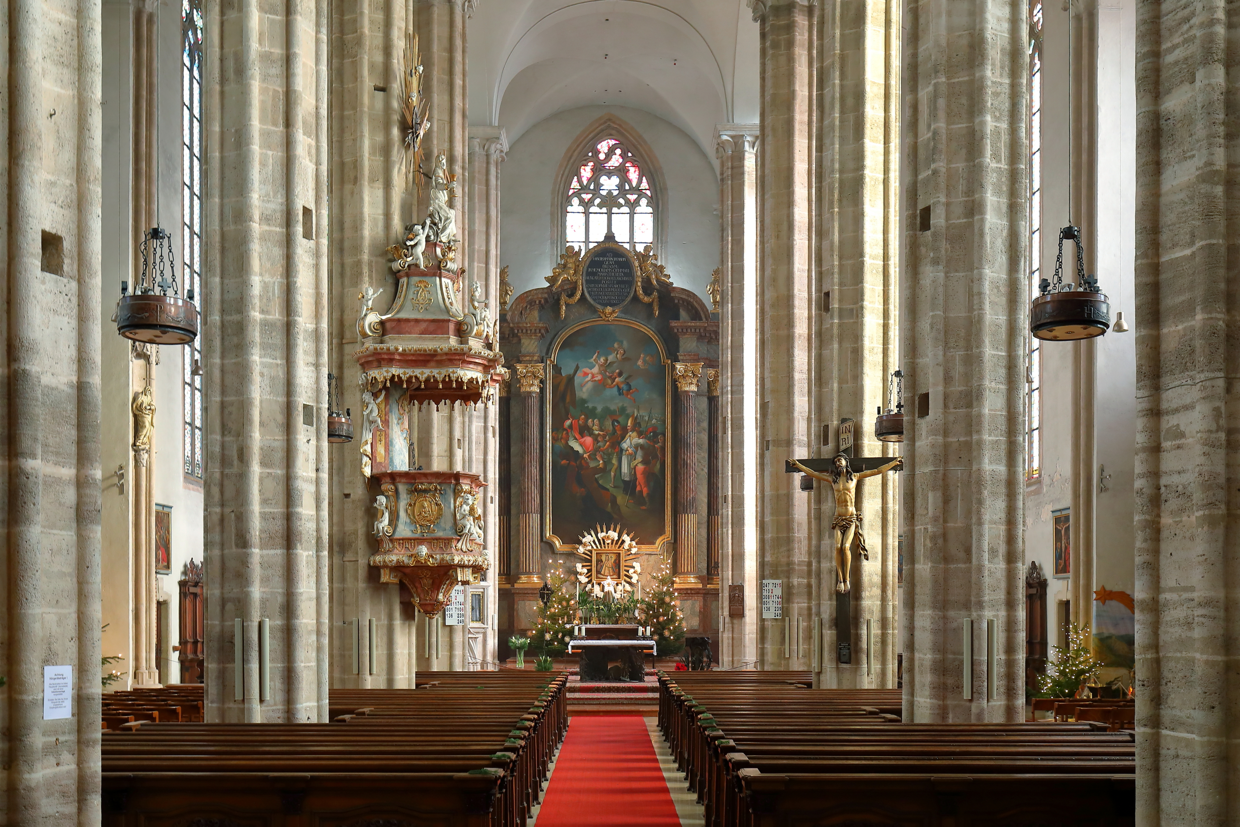 Innenansicht der röm.-kath. Pfarrkirche St. Othmar in der niederösterreichischen Stadt Mödling.Die dreischiffige, gotische Hallenkirche wurde von 1454 bis 1523 errichtet. Der barockklassizistischer Hochaltar aus dem Jahr 1760 wurde von der Regentin Maria Theresia gestiftet. Die spätbarocke Kanzel stammt aus dem Jahr 1720 und das Kruzifix aus der 1. Hälfte des 16. Jahrhundert. Von 1875 bis 1897 erfolgte eine Generalsanierung und Regotisierung.